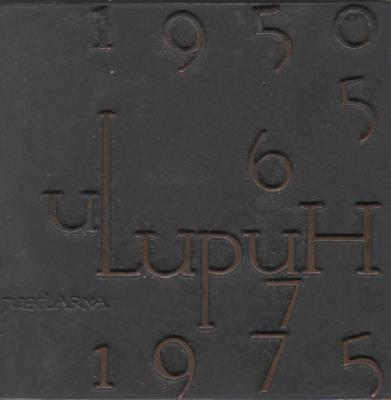 Dinko Vranković - plaketa povodom 25 godina ULUPUH-a